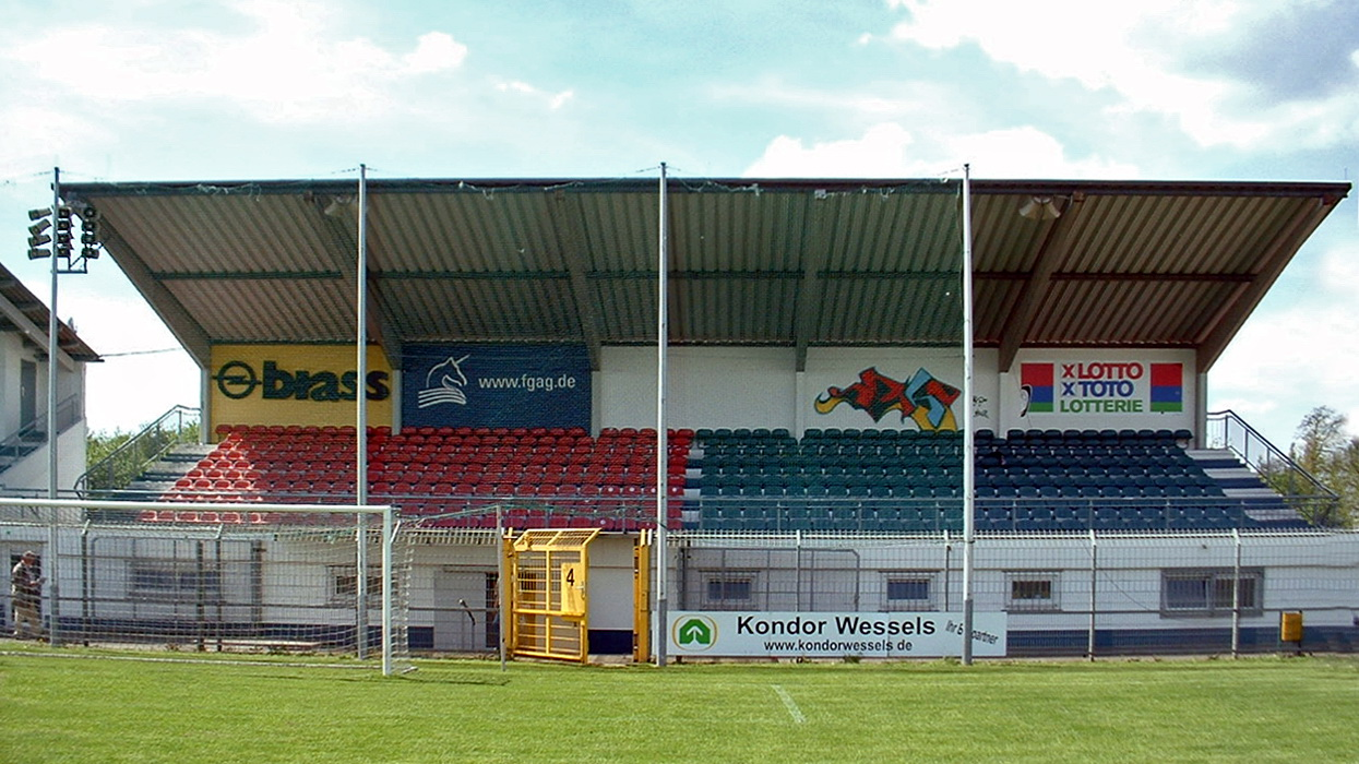 Stadion am Schönbusch, Aschaffenburg: Die 1985 errichtete Tribüne, damals Haupttribüne an der Gegengeraden, nach Drehung des Spielfeldes nun Hintertortribüne